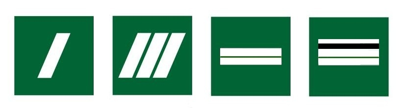 Les grades de poitrine des gardes champêtres